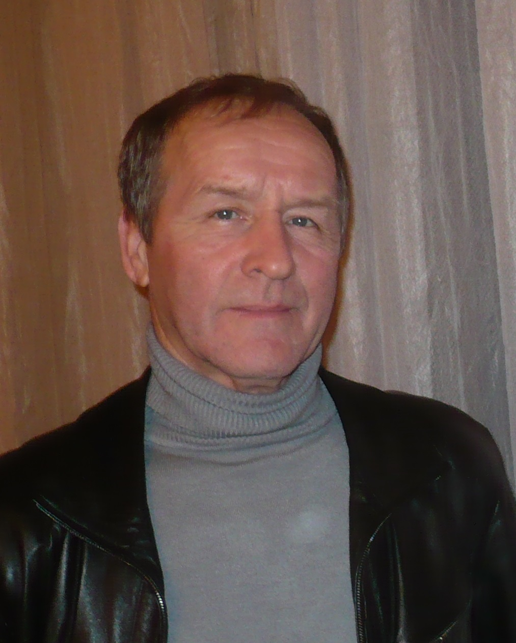 Каратов, Сергей Фёдорович